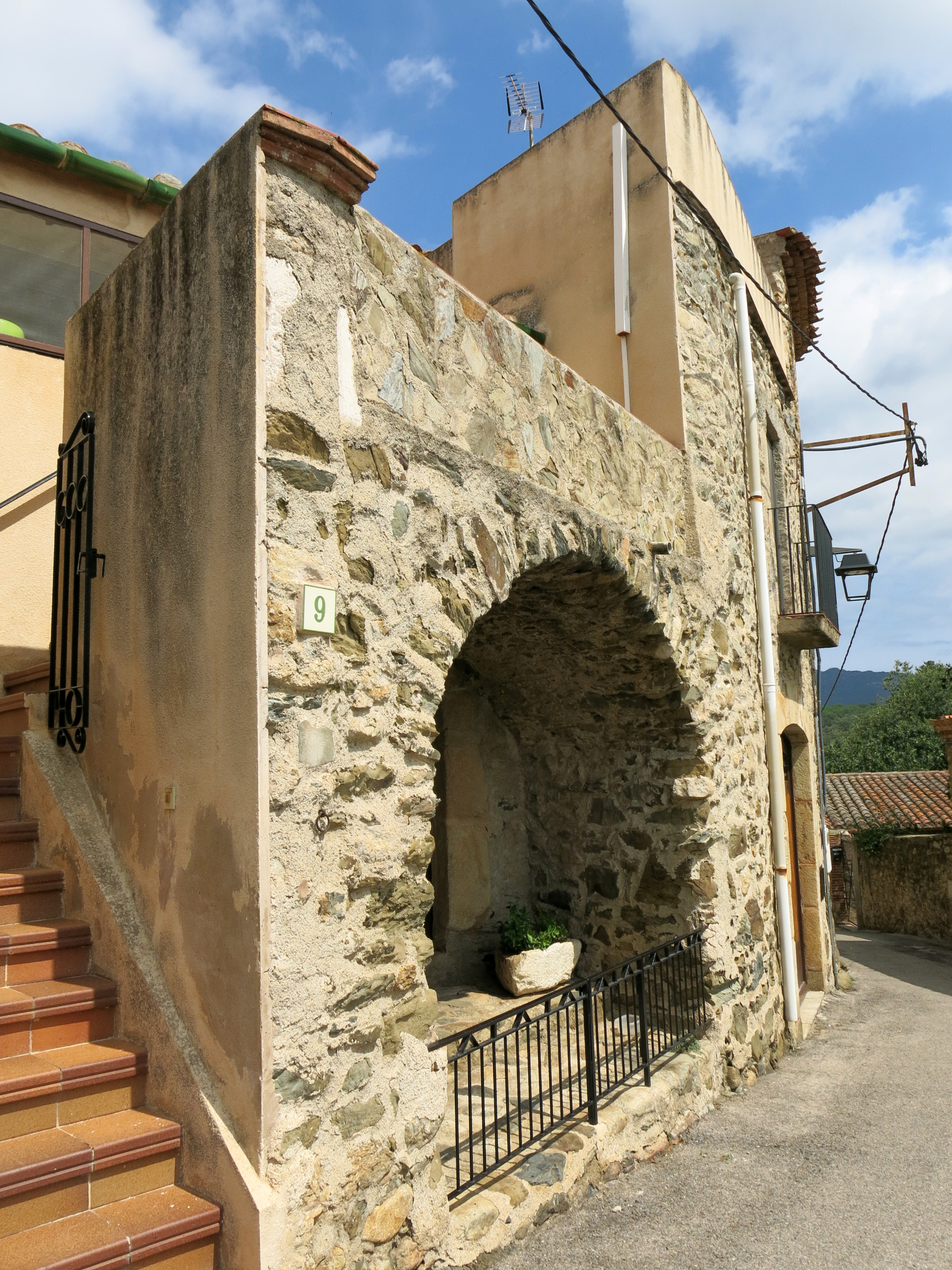 Conjunt del carrer del Pont (Rabós)